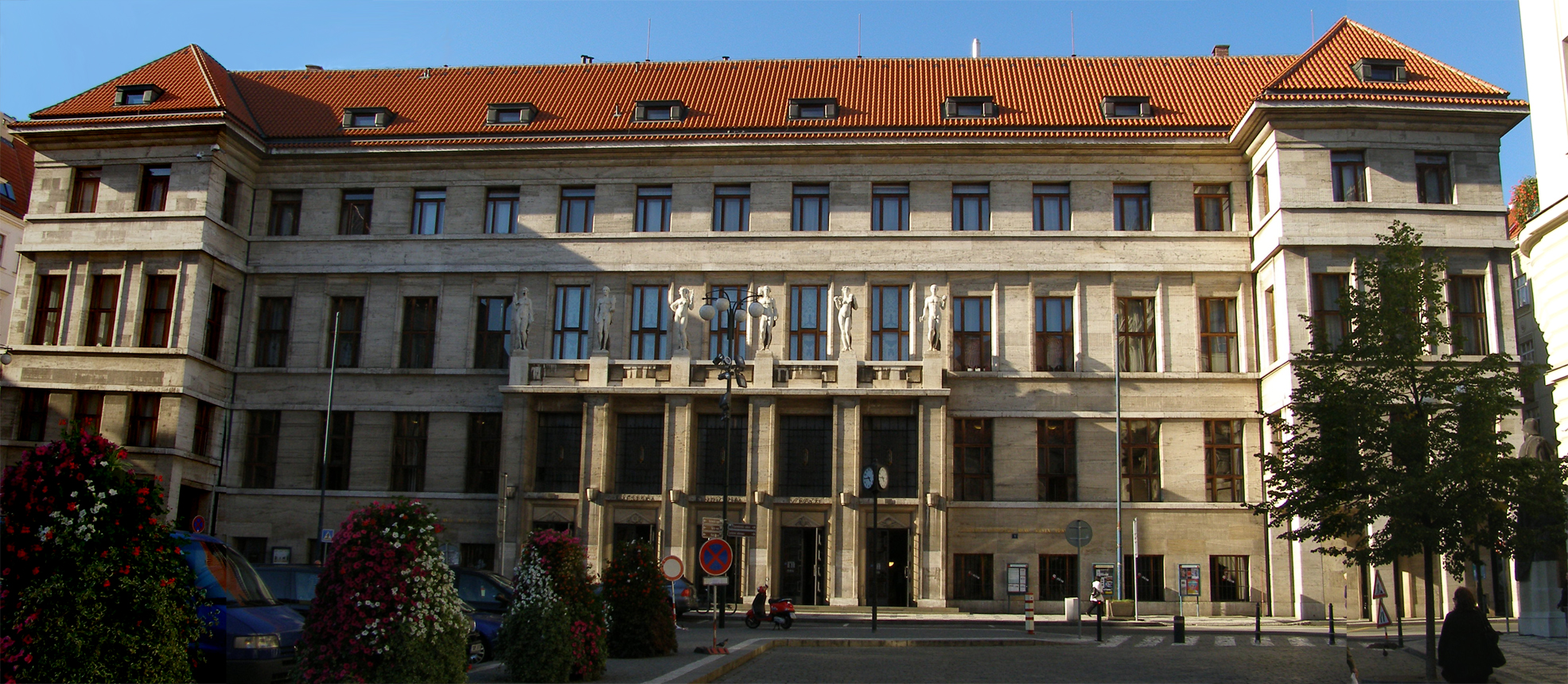 Městská knihovna (Staré Město), Praha 1, Mariánské nám., Valentinská, Žatecká 98/1, Staré Město